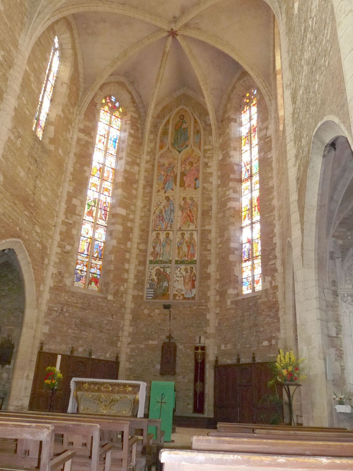 Choeur de la cathédrale d'Eauze (32), France